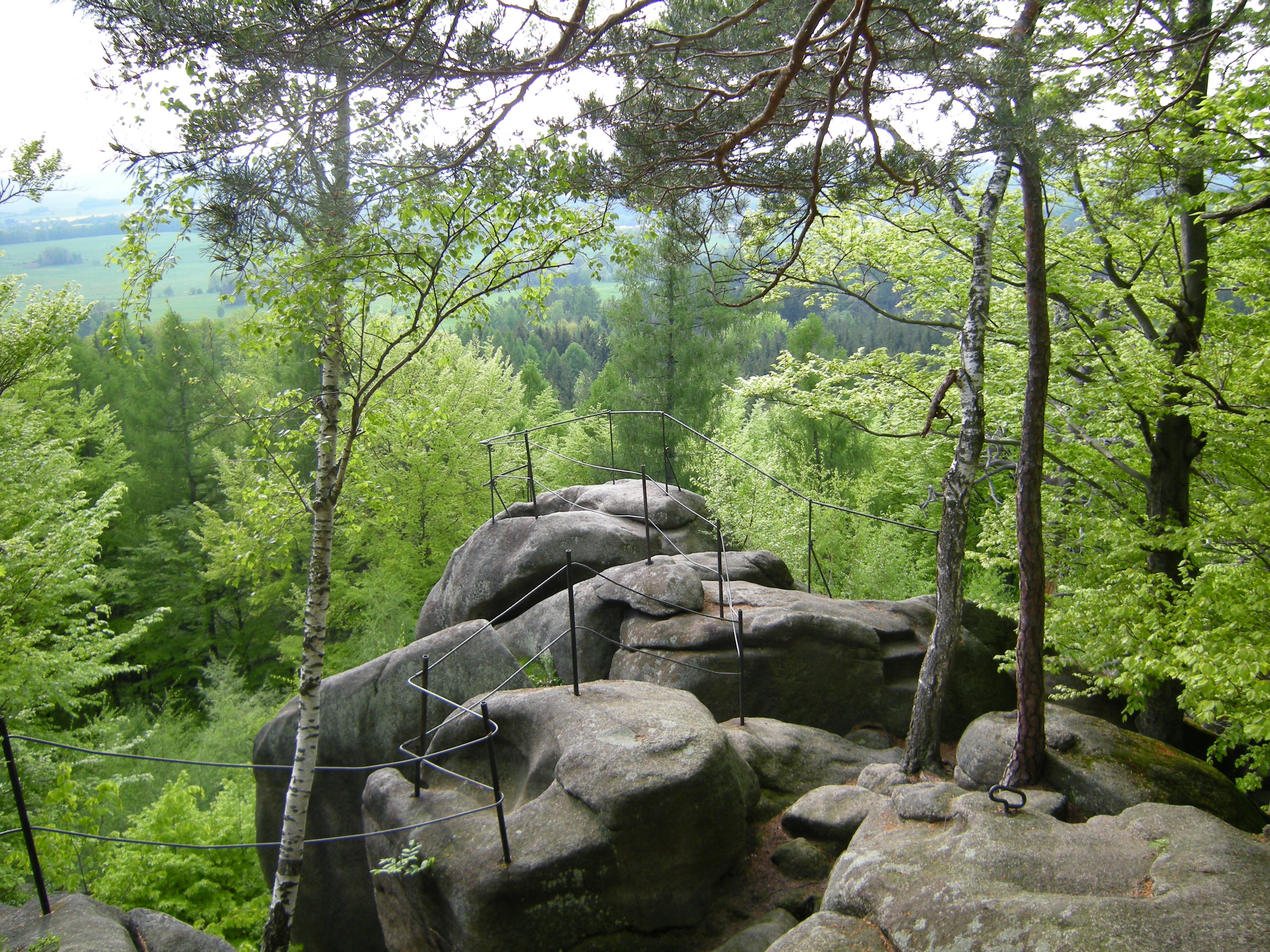 Skały na Smolnym vrchu